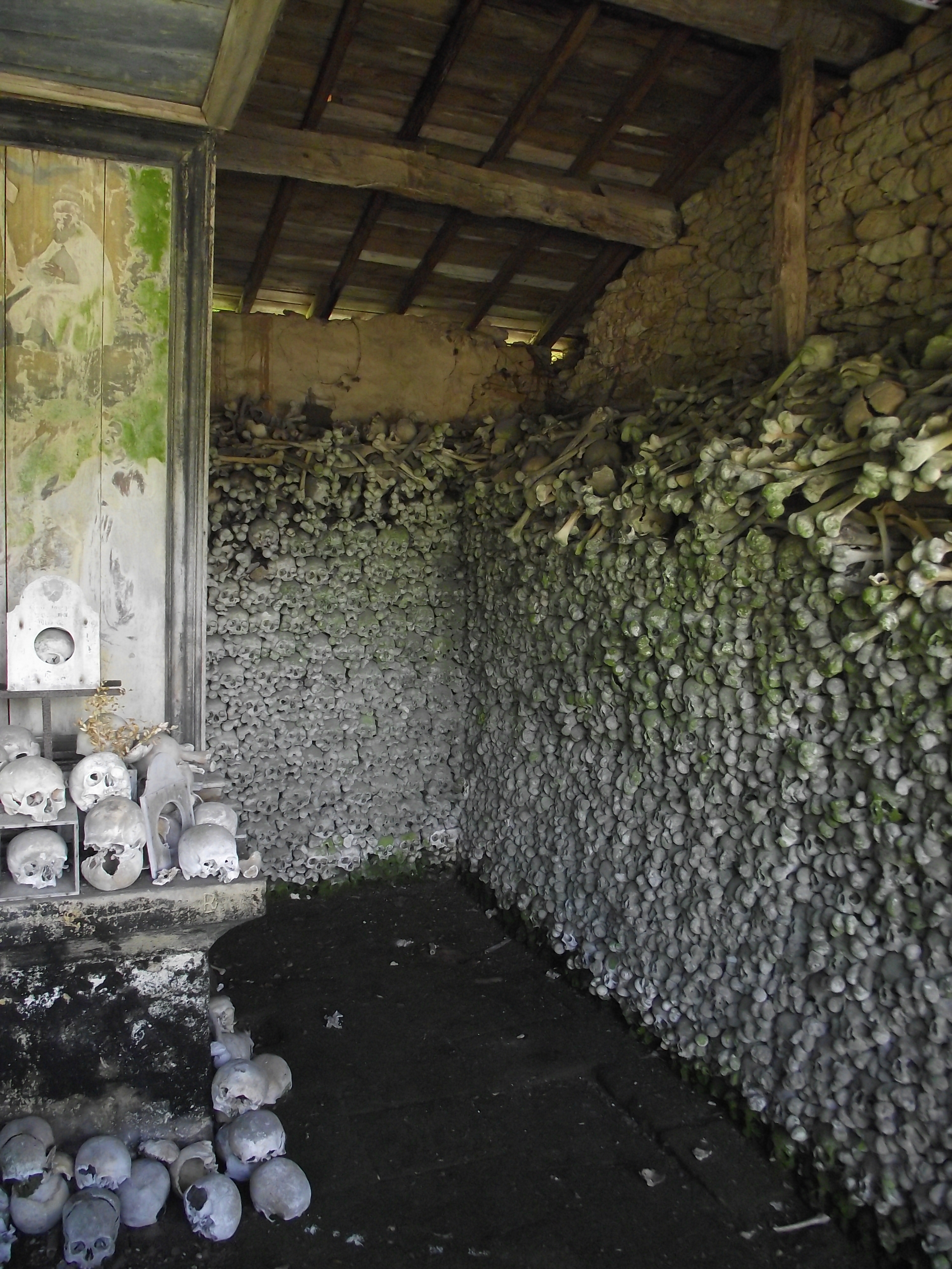 Ossuaire dans le cimetière de Marville (Meuse).